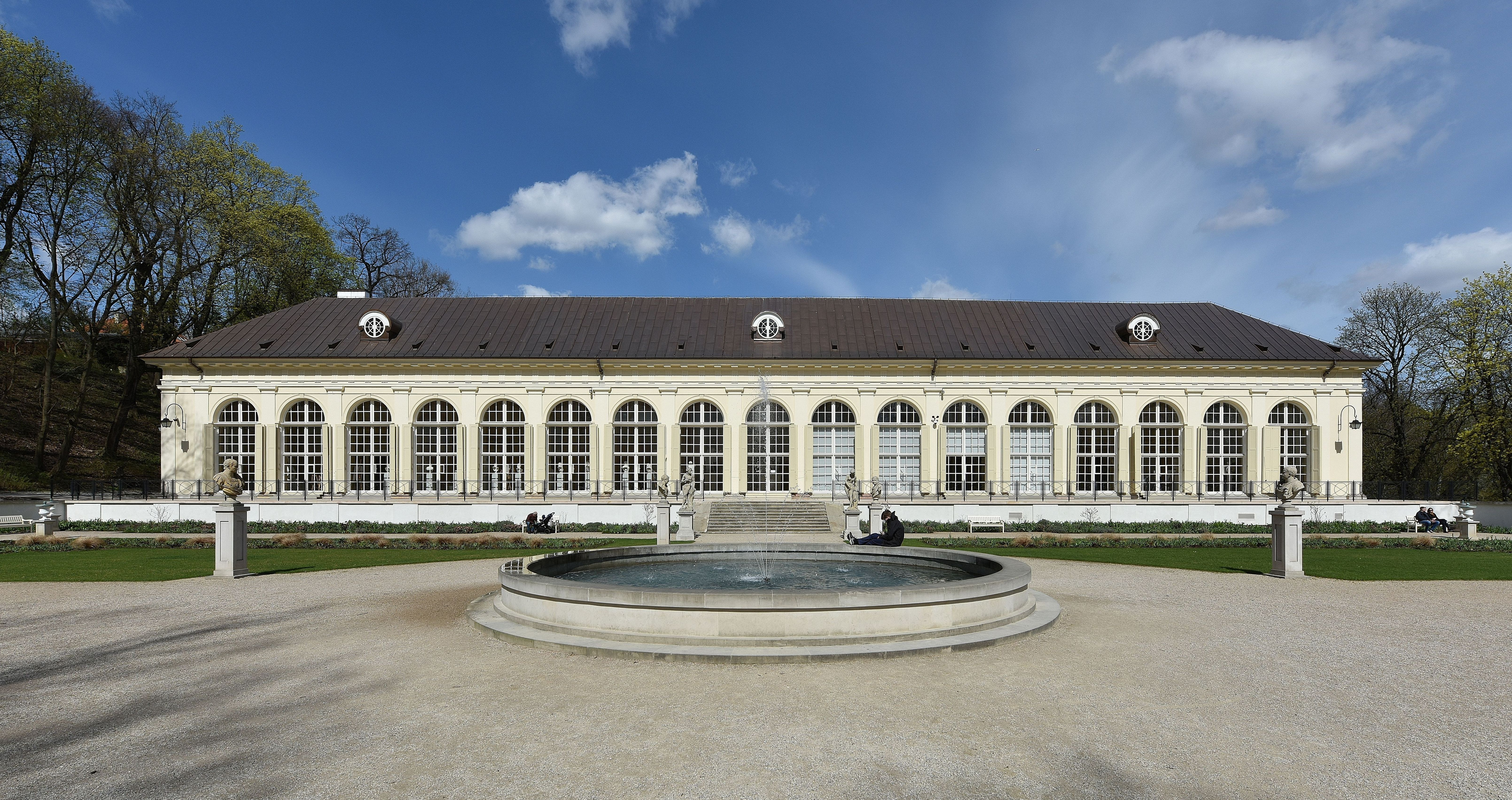 Stara Pomarańczarnia w Łazienkach Królewskich